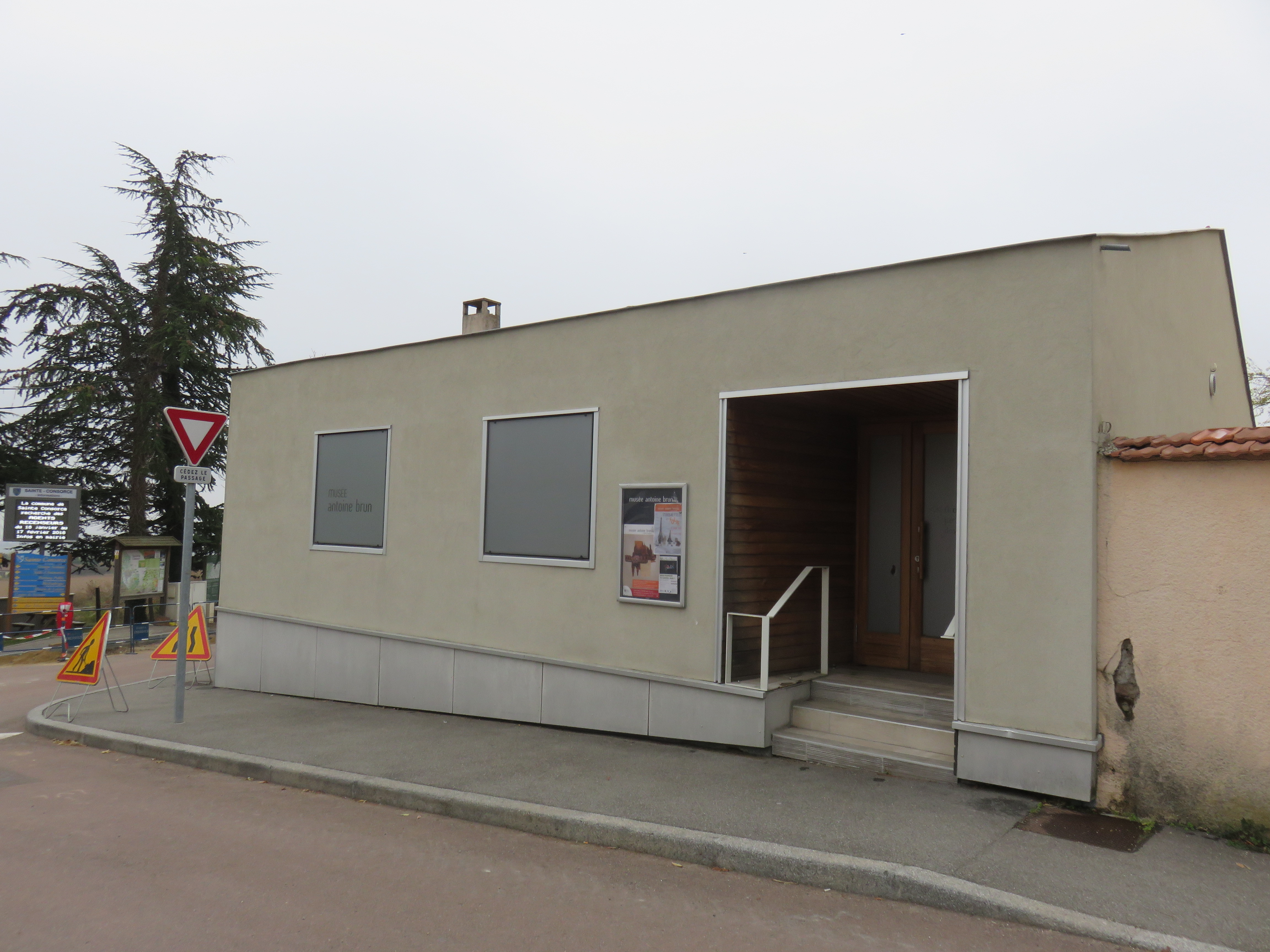 Le musée Antoine-Brun à Sainte-Consorce (Rhône, France).